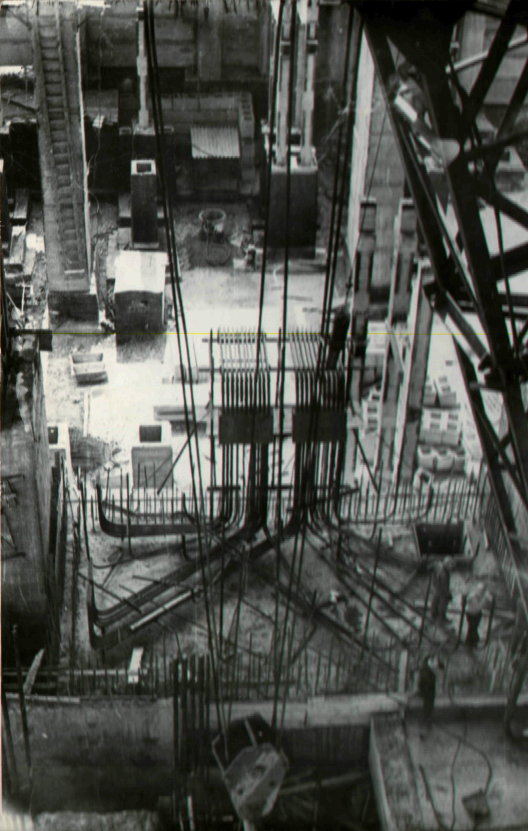 Авторский надзор Свердловского отделения Г.П.И. Тяжпромэлектропроект за реконструкцией универсального балочного стана на НТМК в 1976-1977гг.